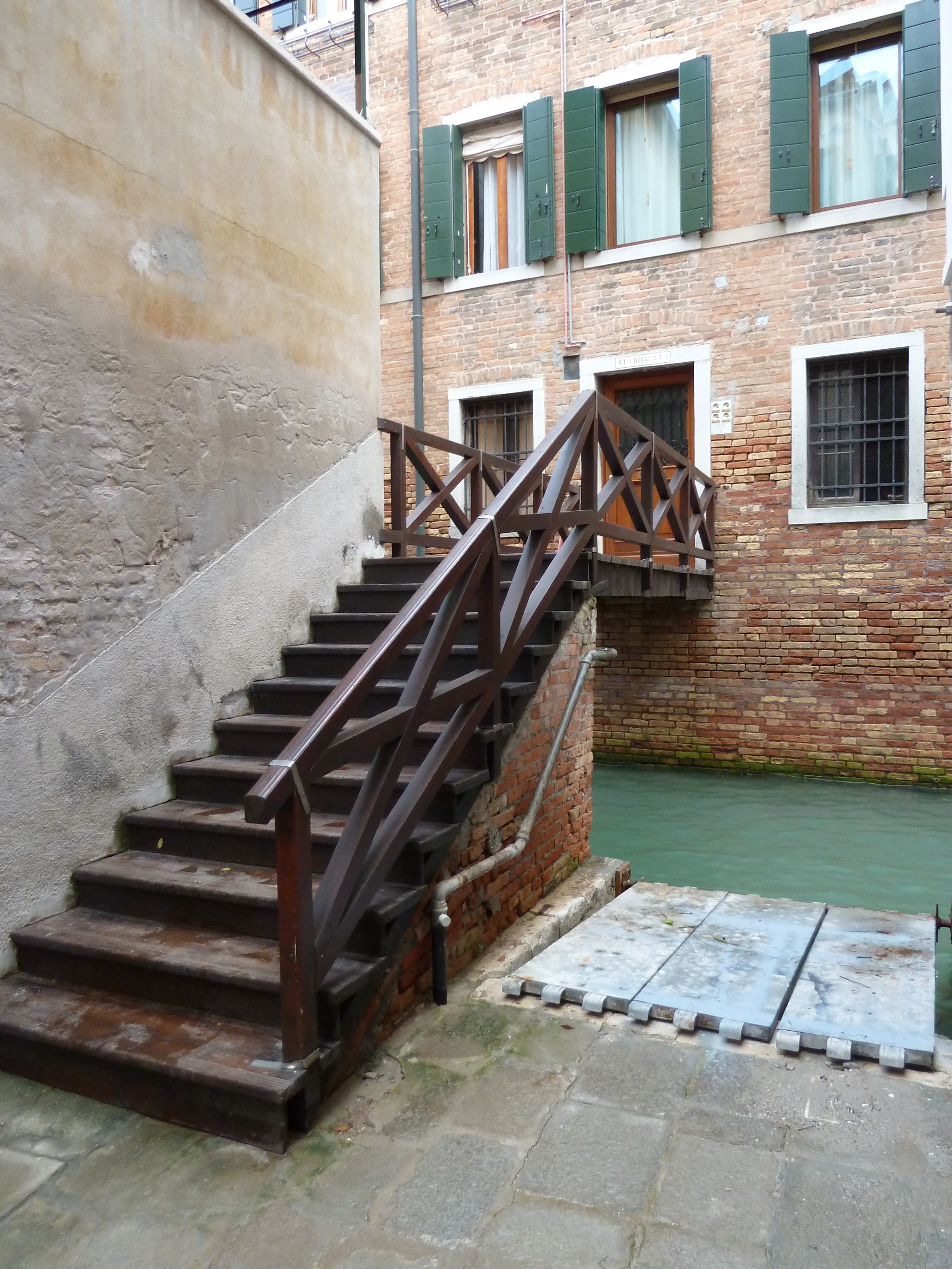 Rio dl racheta